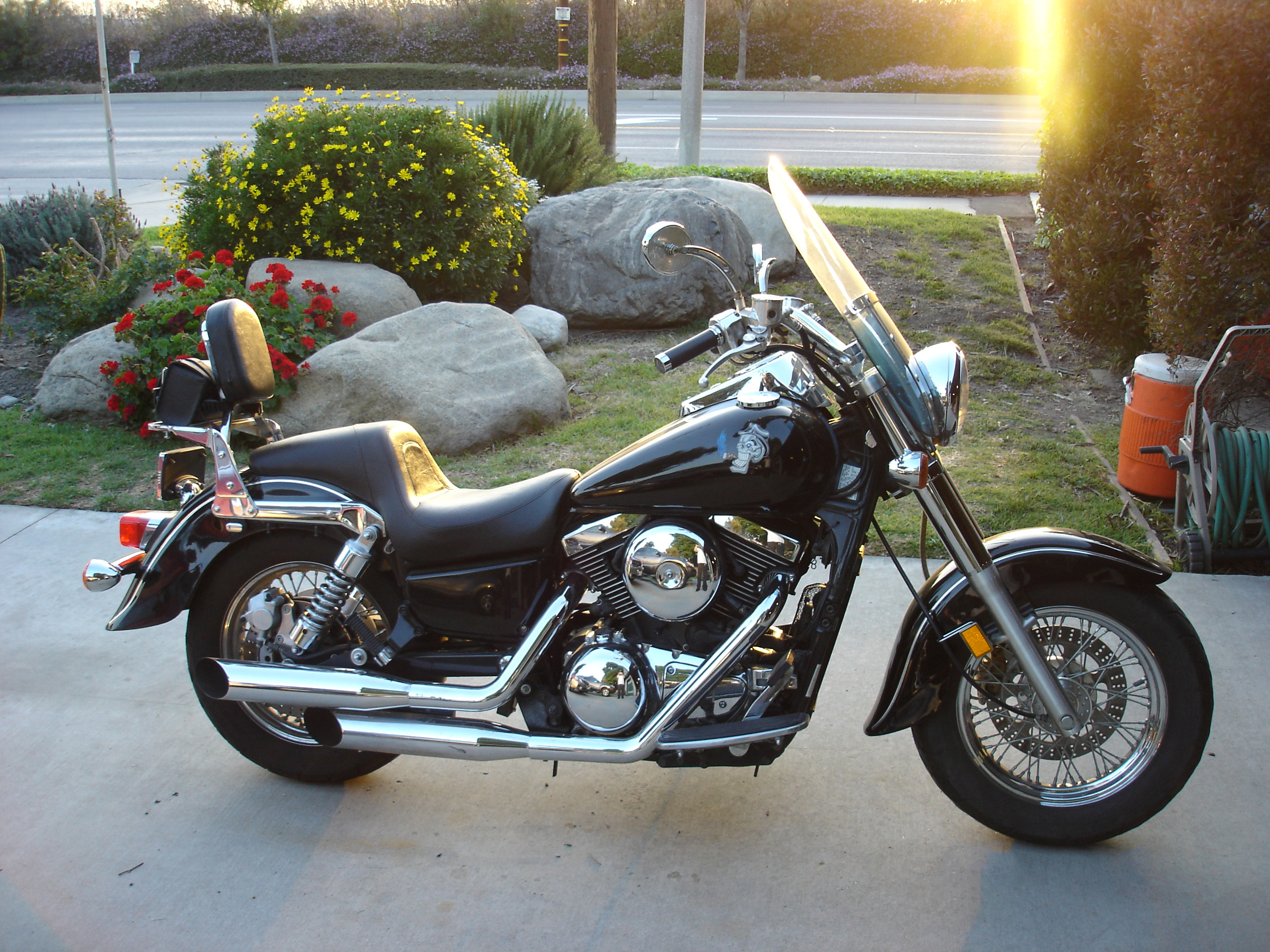 Kawasaki Vulcan 1500cc made in 2000